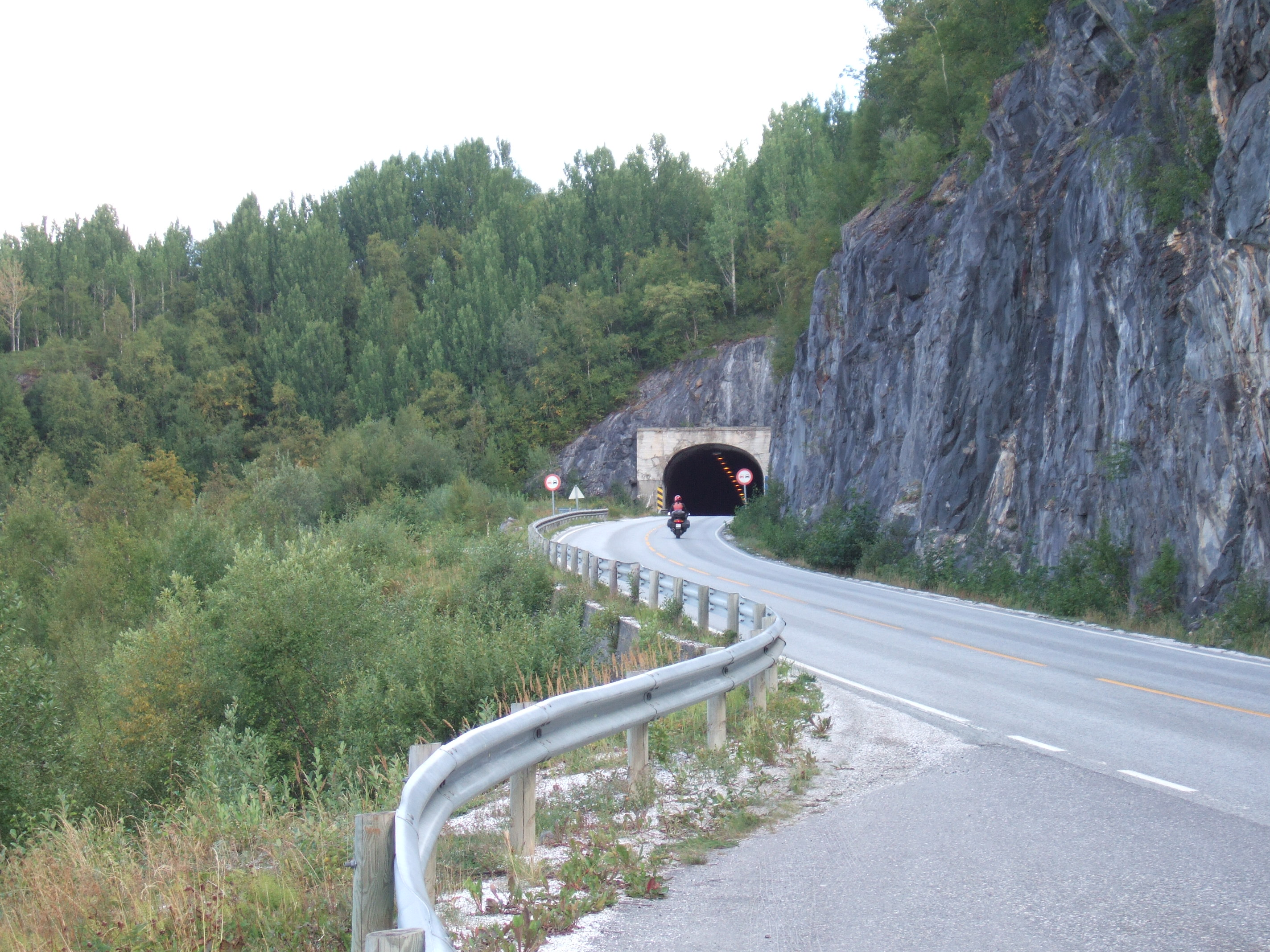 Setsåhøgda tunnel på europavei 6 i Saltdal kommune i Nordland.